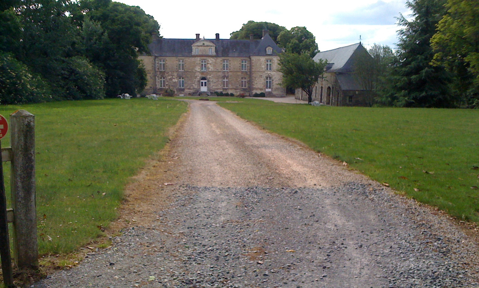 Le Château de Castellan vu de l'entrée principale.